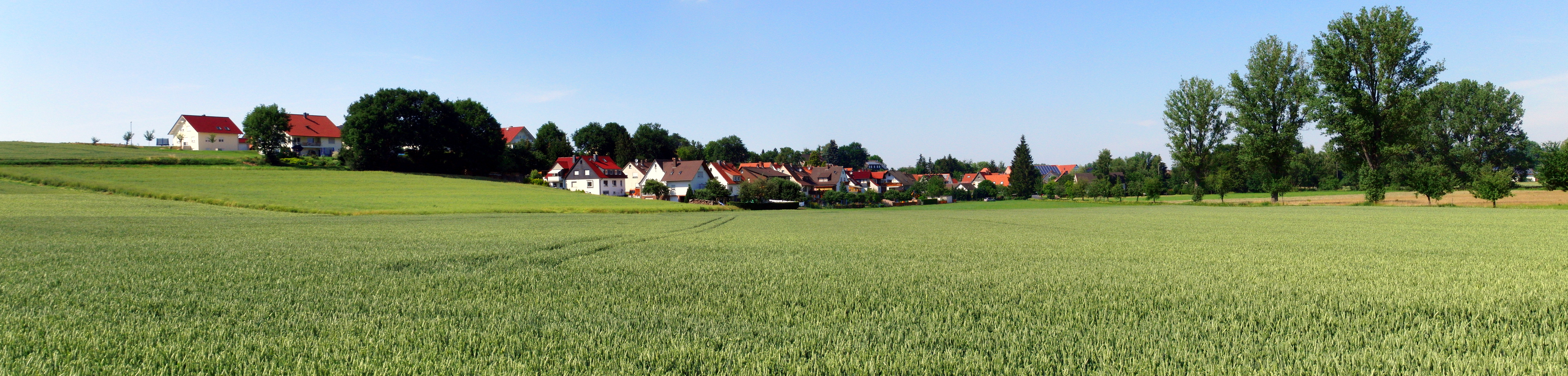 Panorama von Zella (Willingshausen) Hinweis: erstellt mit der Freeware Hugin 2010